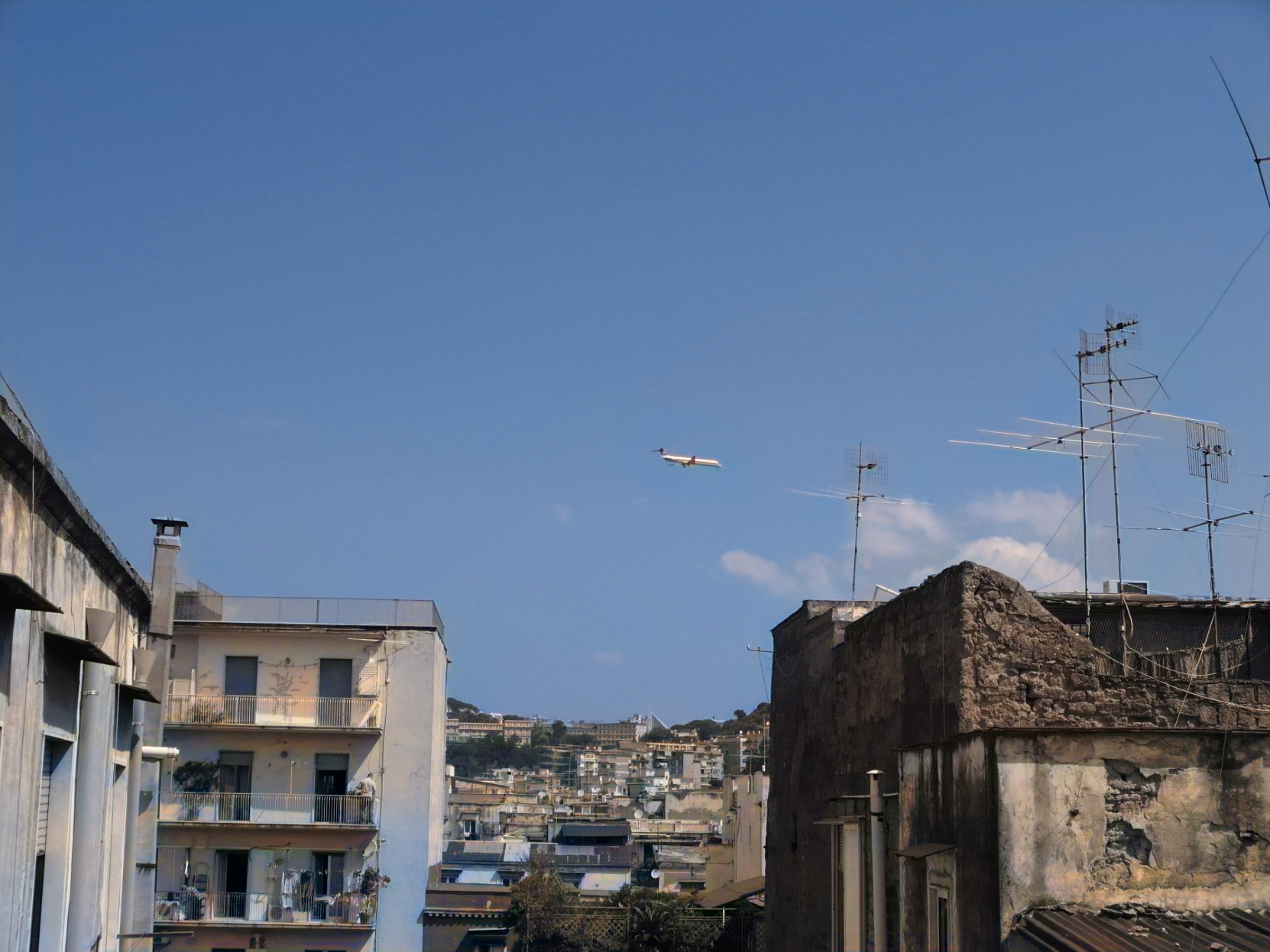 Aereo di linea (MD-82) in fase di atterraggio verso l'aeroporto di Napoli-Capodichino mentre sorvole la collina di Capodimonte